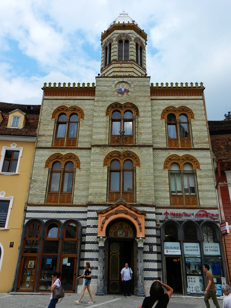 Casa parohială 02